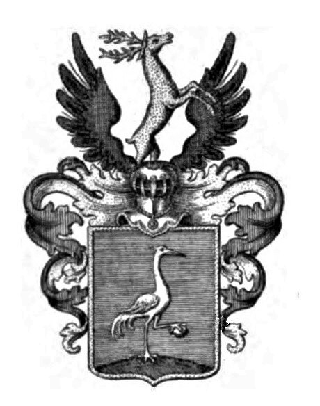 Herb Eleonory Johanny von Pertke von Pertkenau (1759-1827) żony Carla Friedricha von Seherr-Thoß (1754-1814)